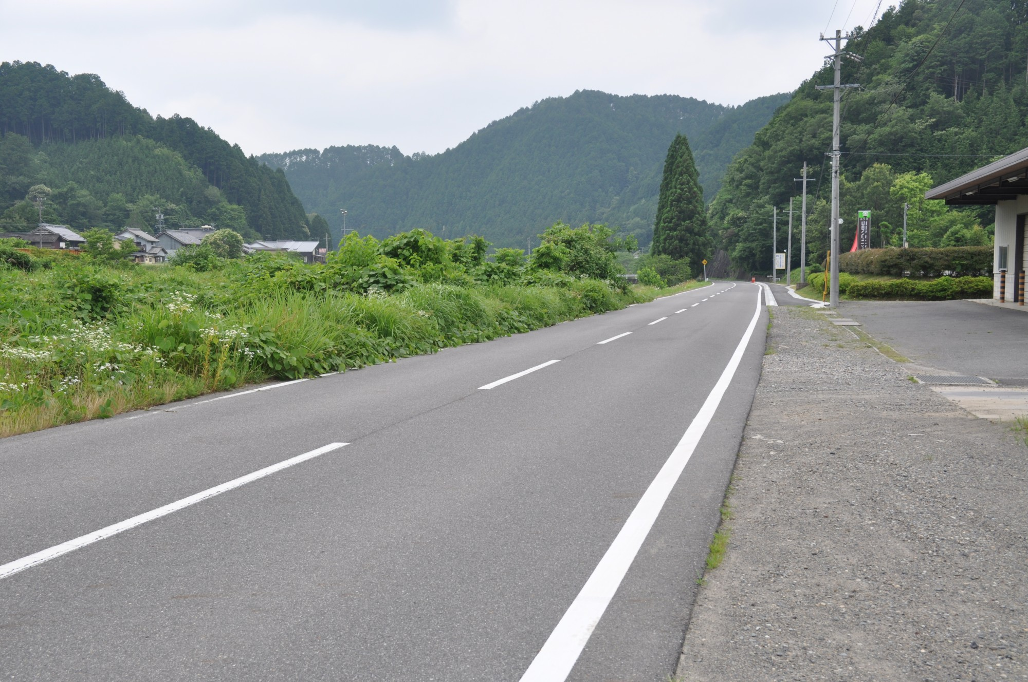 岐阜県道64号・七宗町神淵地内